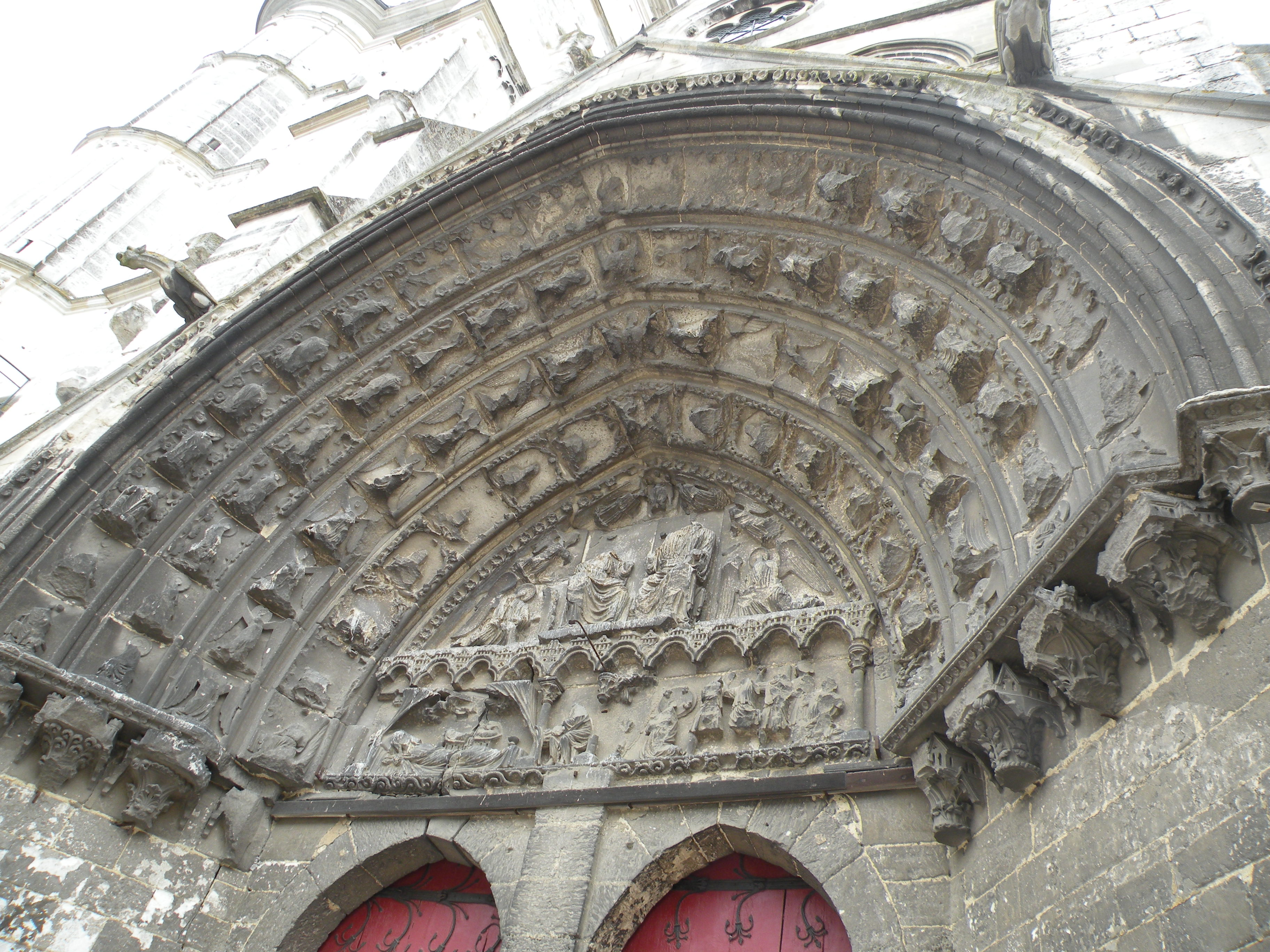 tympan de la grande porte de l'église